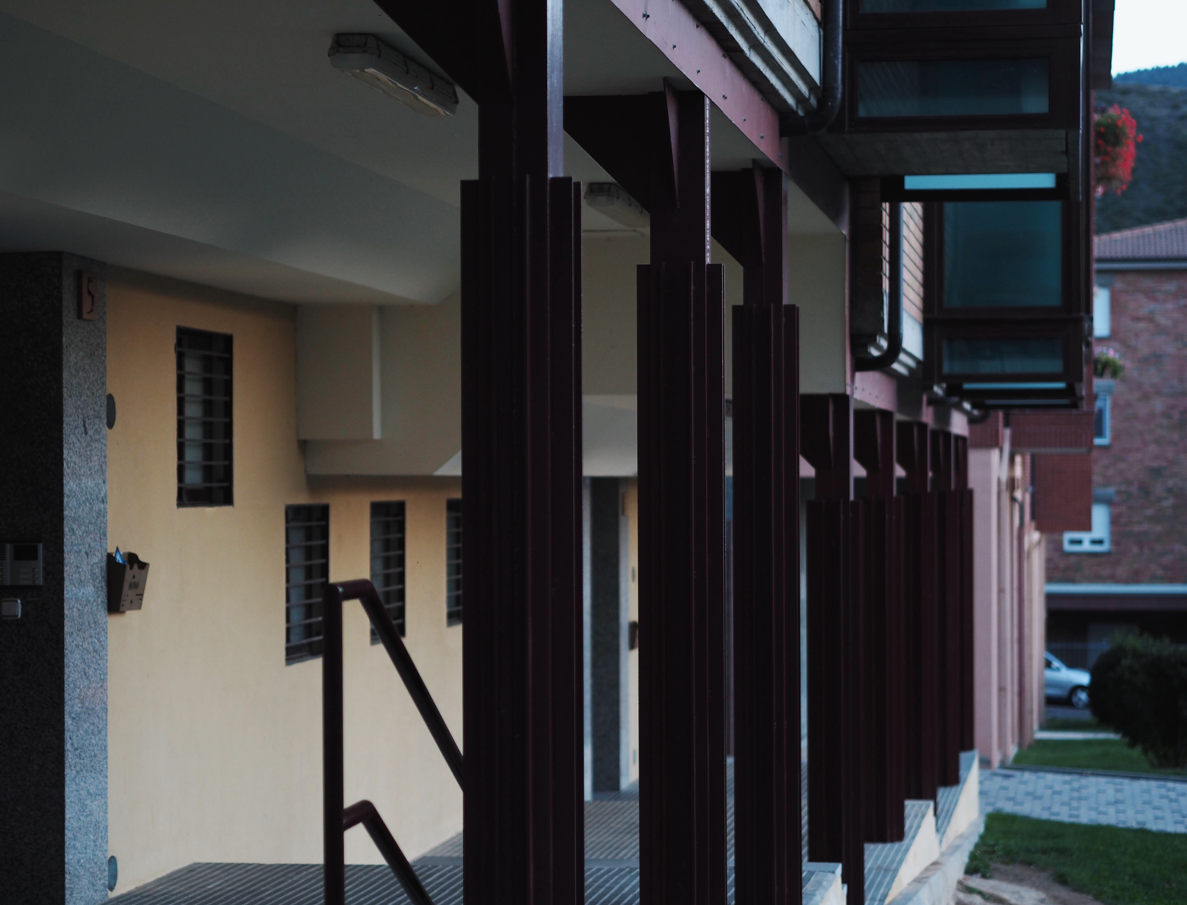 Estructura de acero del edificio de la Plaza San Francisco Javier 3 y 5 en Sabiñánigo.